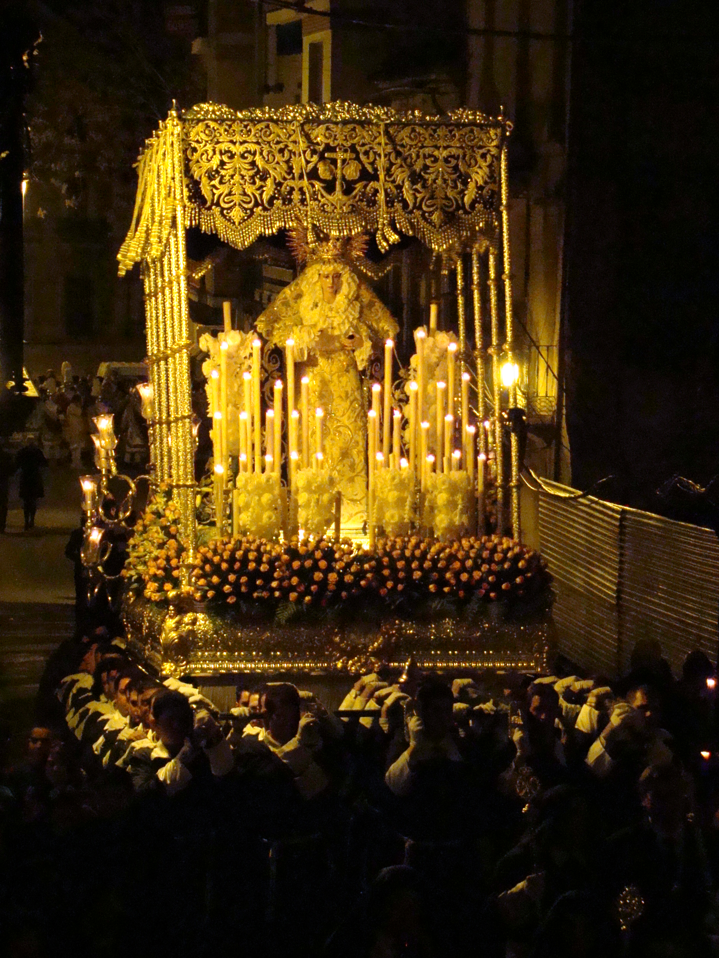 Virgen de la Esperanza en Puente Genil (Córdoba, España)